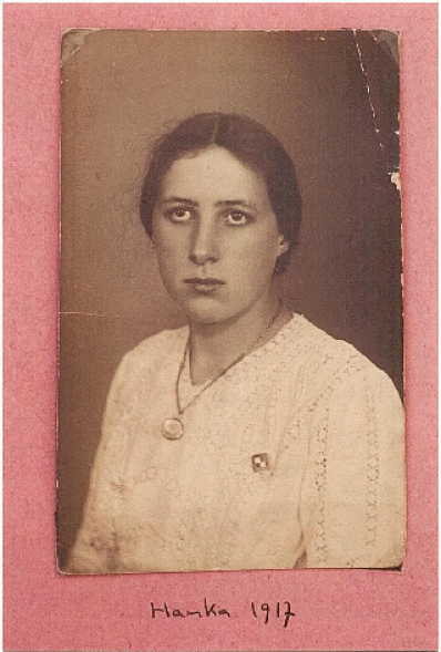 Hanka Grothendieck de son nom de naissance Johanna Grothendieck, née le 21 août 1900 à Blankensee (Allemagne) et morte à Bois-Colombes le 16 décembre 1957, est une comédienne et journaliste, liée au milieu bohème et anarchiste de Berlin dans les années 1920, où elle rencontre son compagnon Sacha Schapiro. Elle est la mère du mathématicien Alexandre Grothendieck.